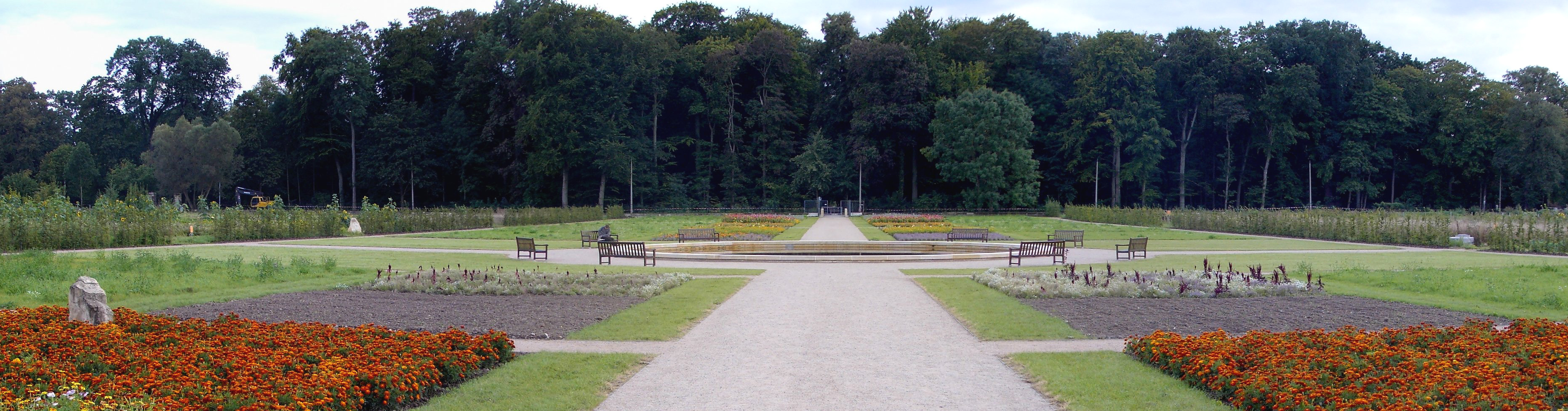 Panorama des Brühls in Quedlinburg (Germany) mit dem Abteigarten im Vordergrund